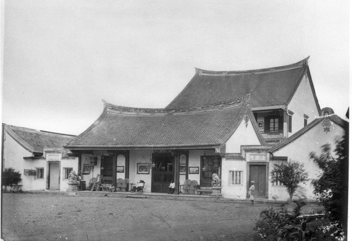 Foto. Een chinese woning in Batavia, Java.